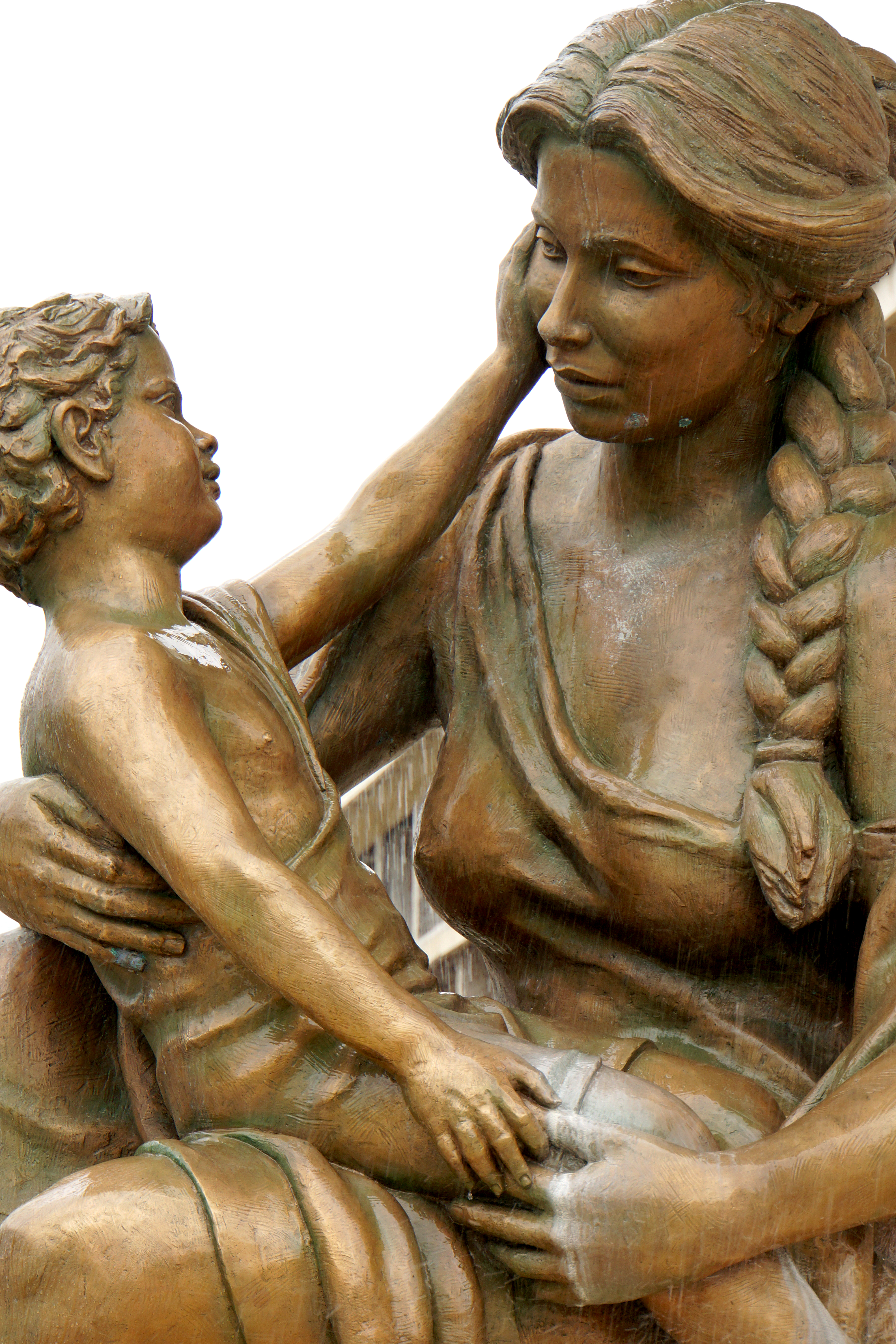 Macedonia